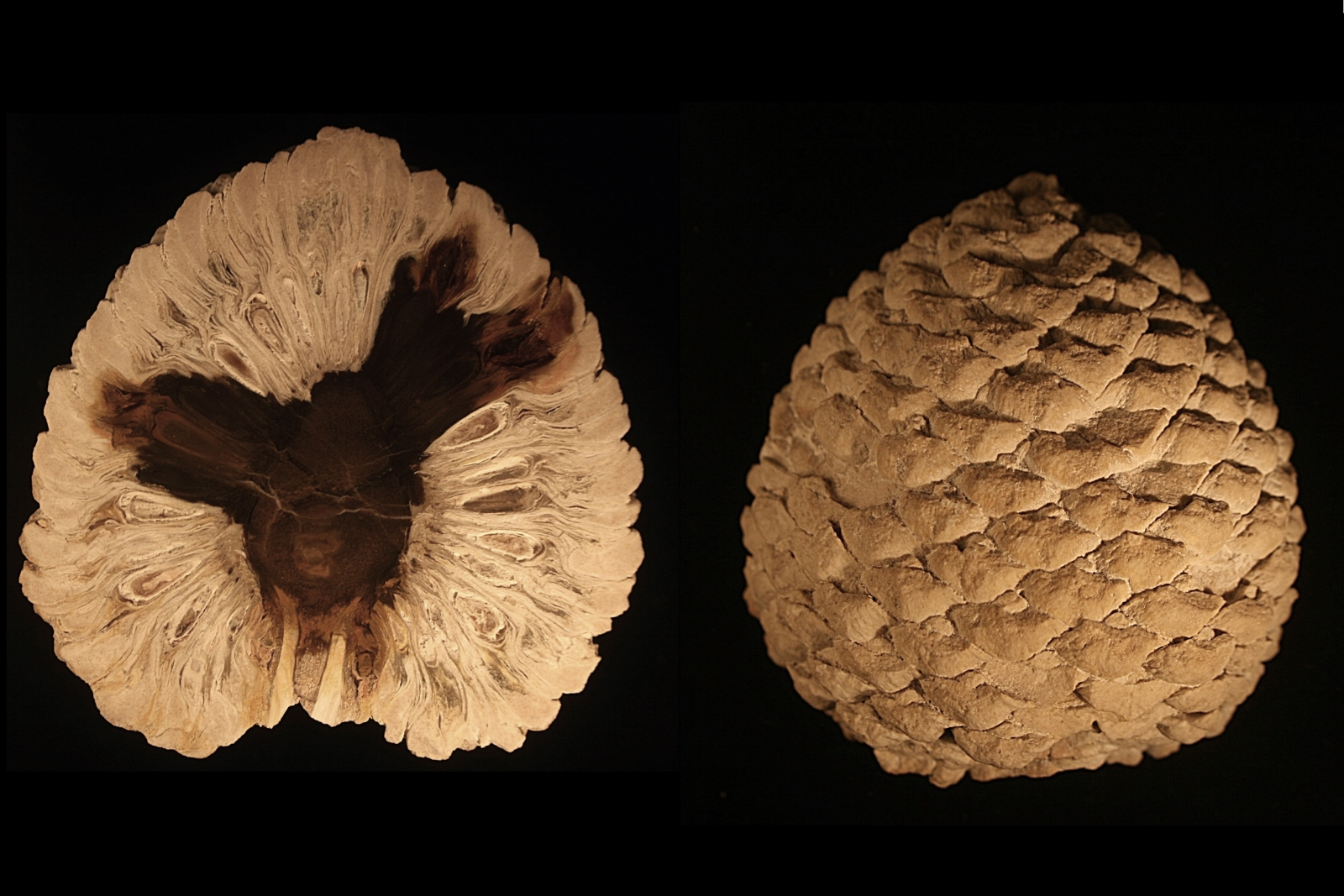 Petrified Araucaria mirabilis Cone; Age: Jurassic (approx. 160 mya);Location: Patagonia, Argentina